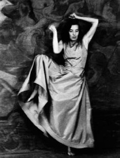 Gret Palucca auf einer Fotografie von Genja Jonas